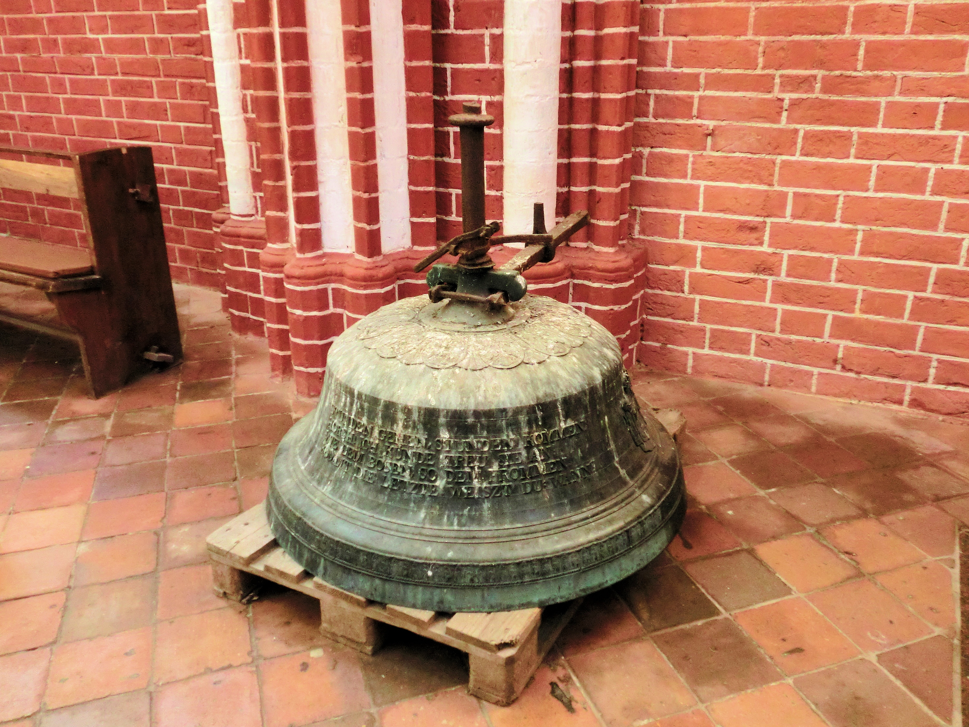 Bad Doberan Münster, defekte Stundenglocke. Inschrift: Stunden gehen, Stunden kommen, horch, ich künde treu sie an, wie dem Bösen, so dem Frommen kommt die letzte, weiszt du wann?